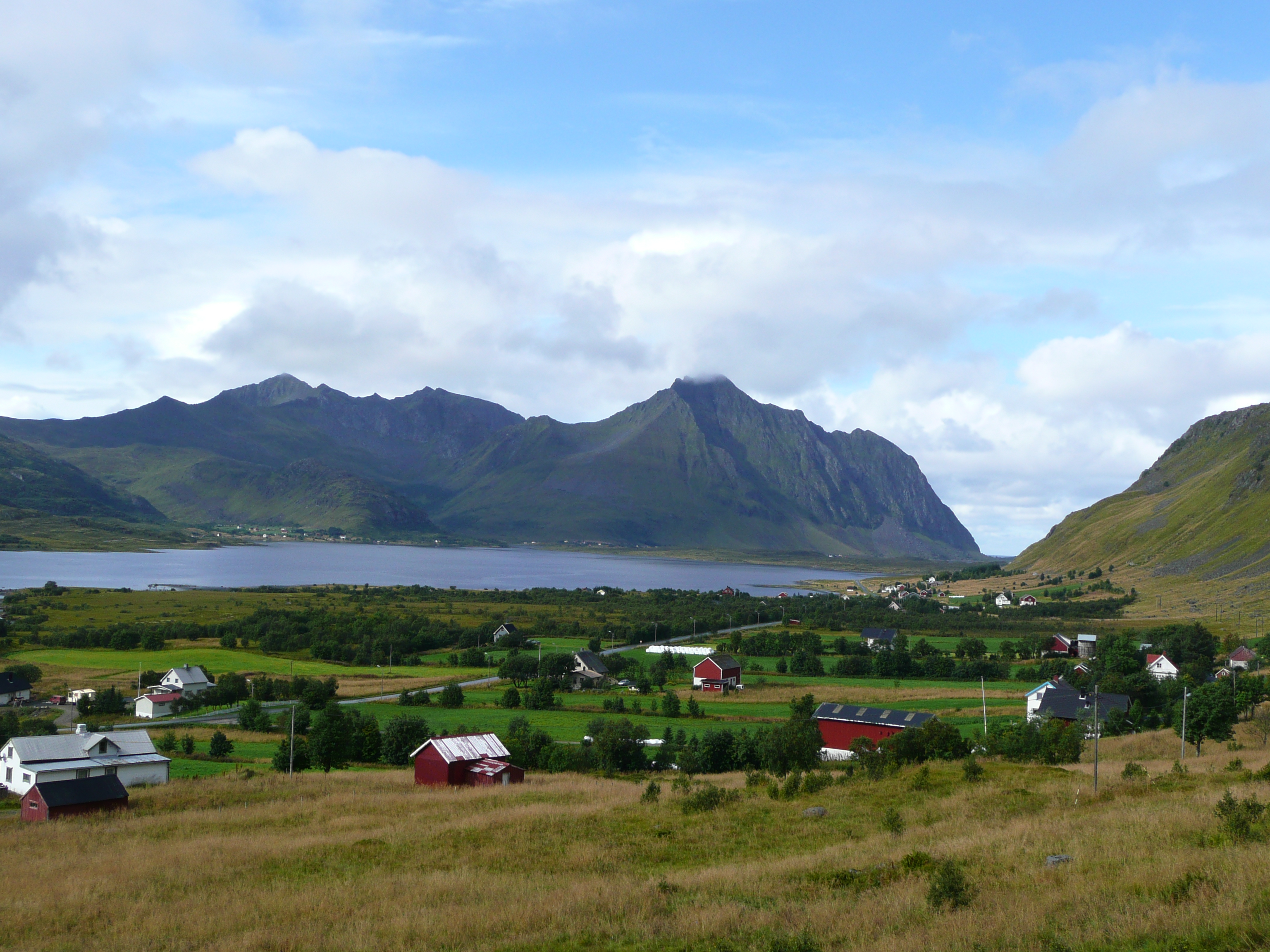 Eggum, Vestvågøy, Lofoten, Norway.